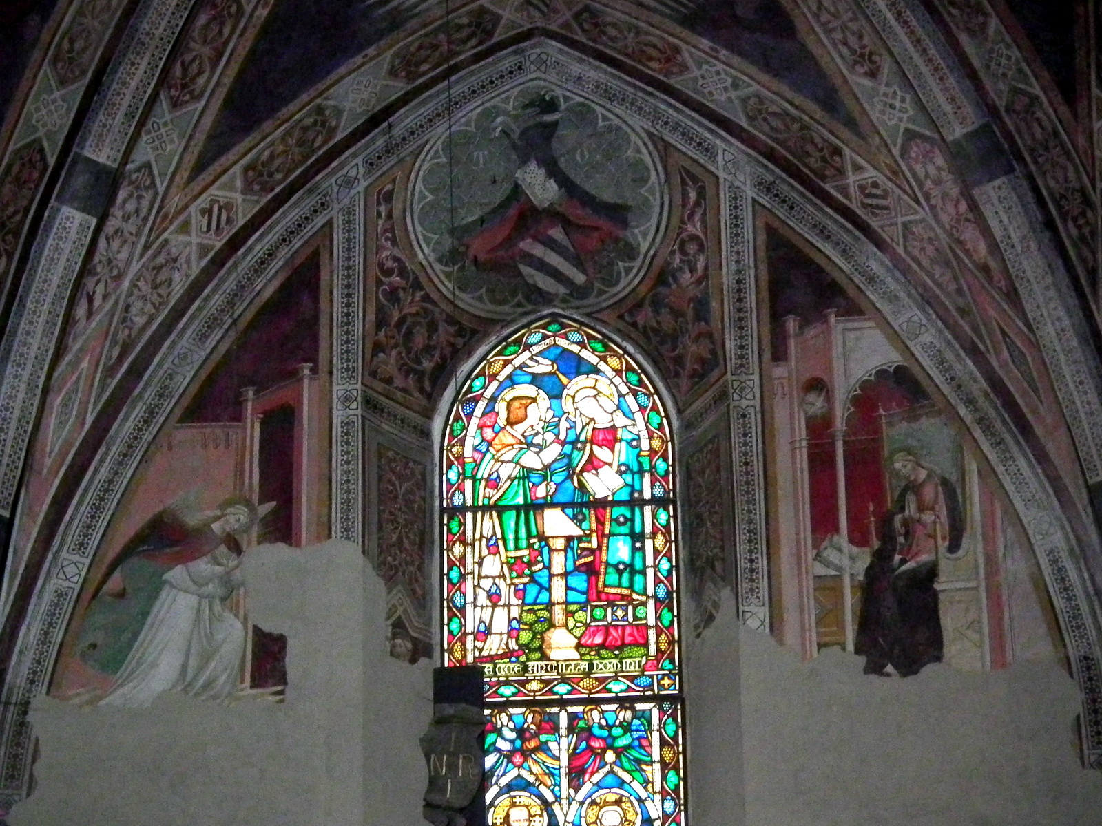 Chiesa di San Francesco, Pescia, Italy